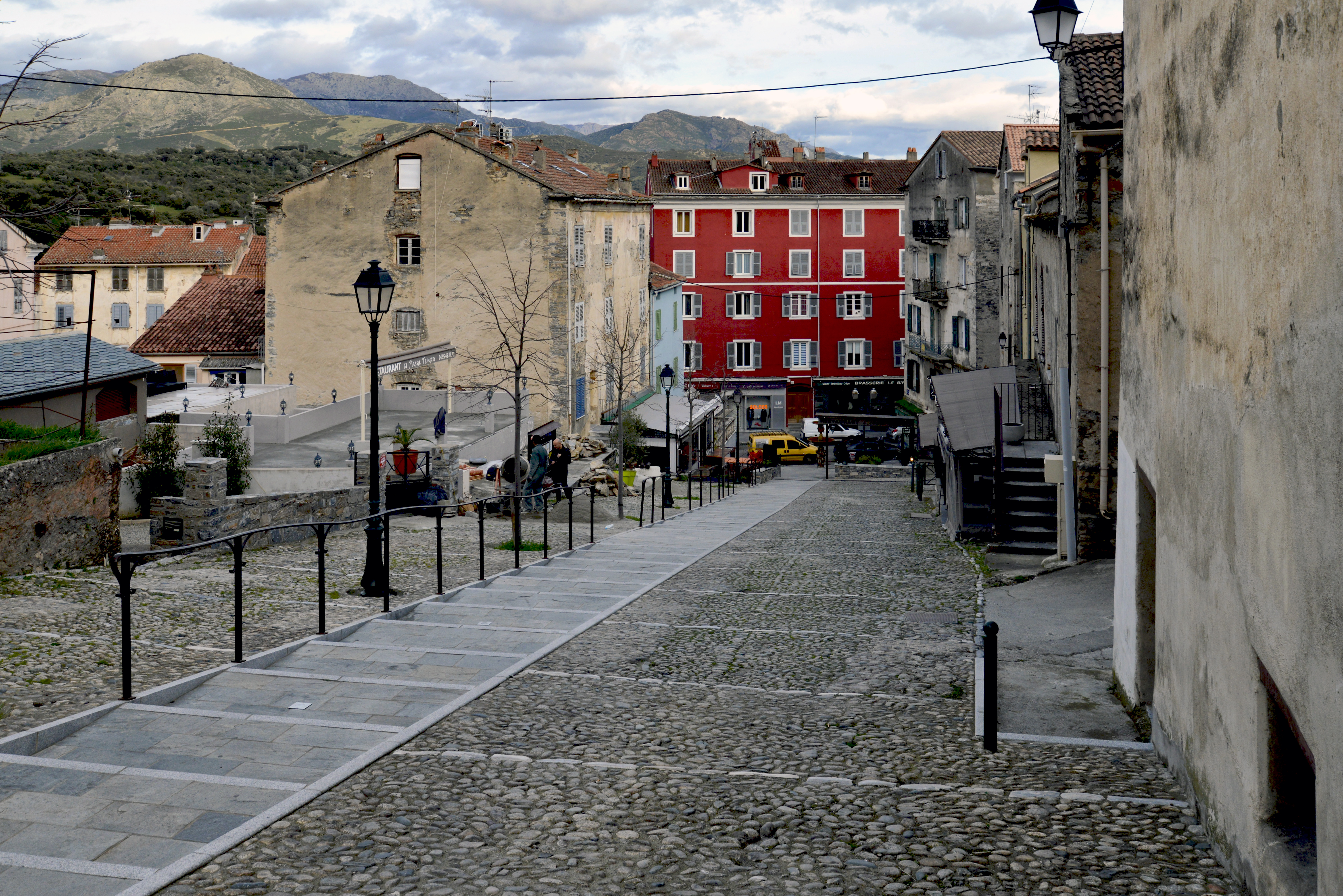 Corte, Centre Corse - La Rampe Saint-Croix, qui relie le cours Paoli (fontaine du Cours) à la rue du Colonel Feracci (chapelle Sainte-Croix)